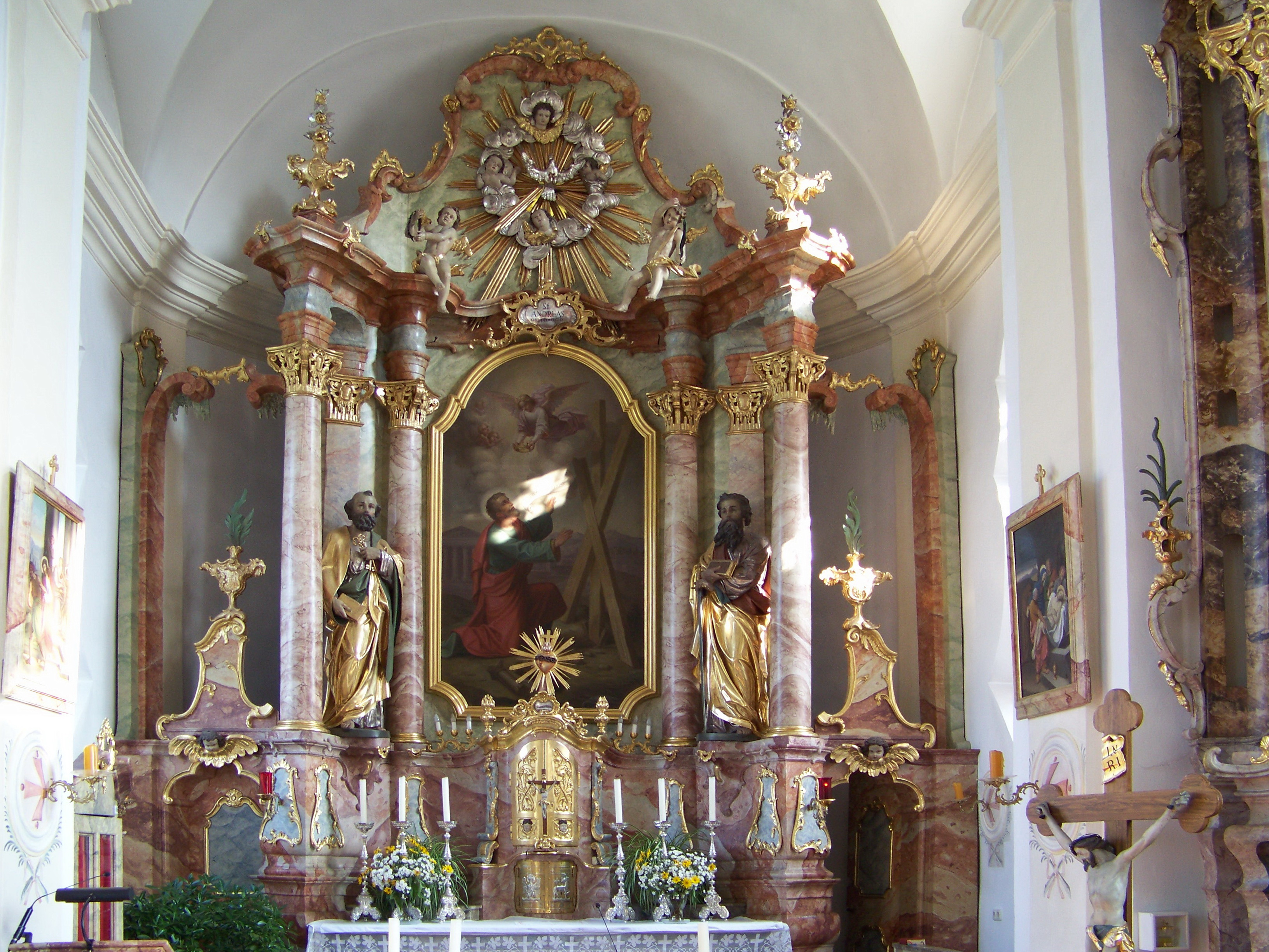 Neufahrn in Niederbayern. Hofendorf 28. Filialkirche St. Andreas. Saalkirche mit eingezogenem Chor und Westturm, Gliederung durch Lisenen und Putzbänder, Westturm mit Geschossgliederung, Achteckaufsatz und Zwiebelkuppel, 1747 von Johann Georg Hirschstötter; mit Ausstattung. Hochaltar St. Andres mit Seitenfiguren St. Petrus und St. Paulus.